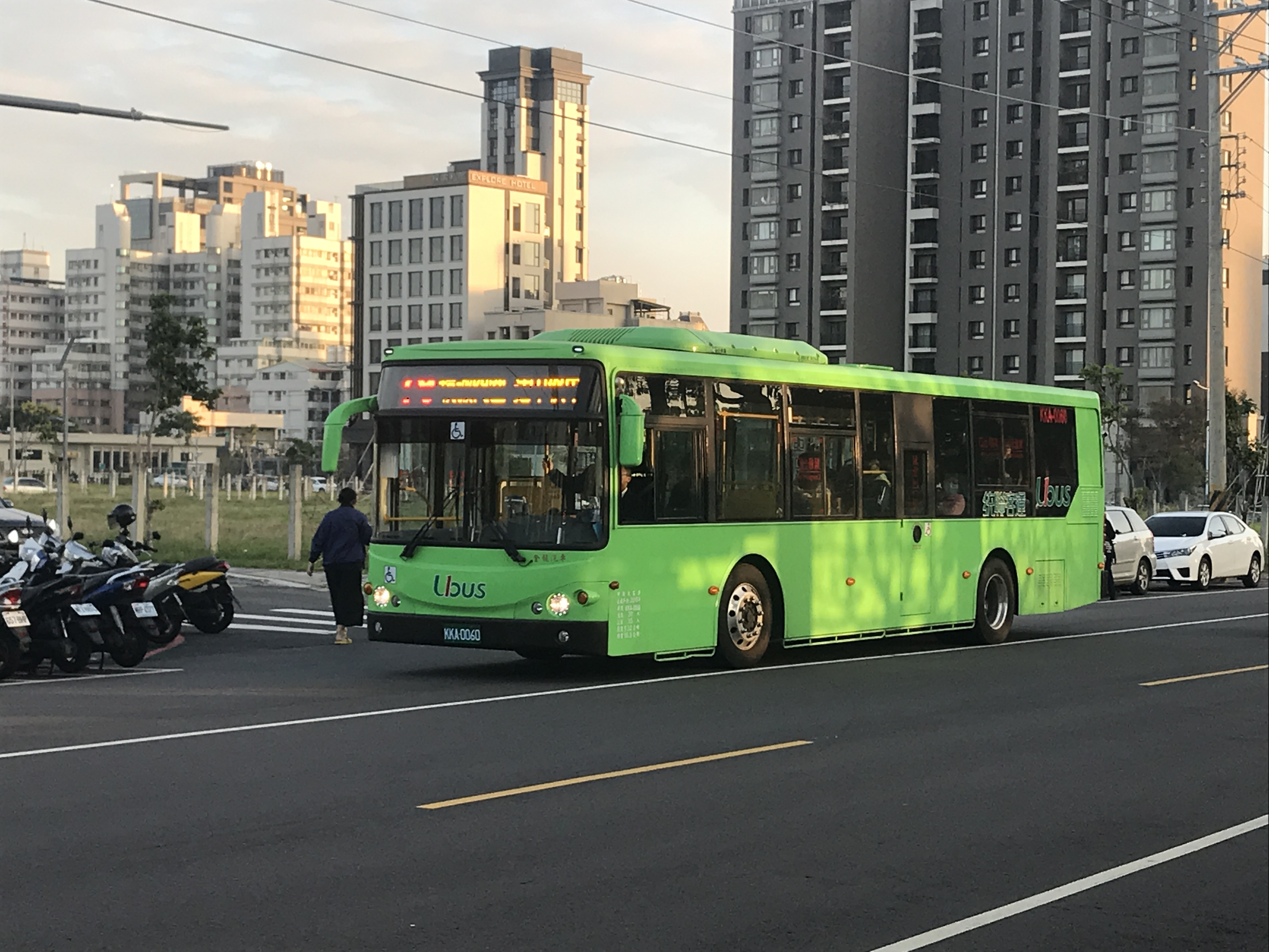 統聯客運KKA-1863行駛台中市公車79路